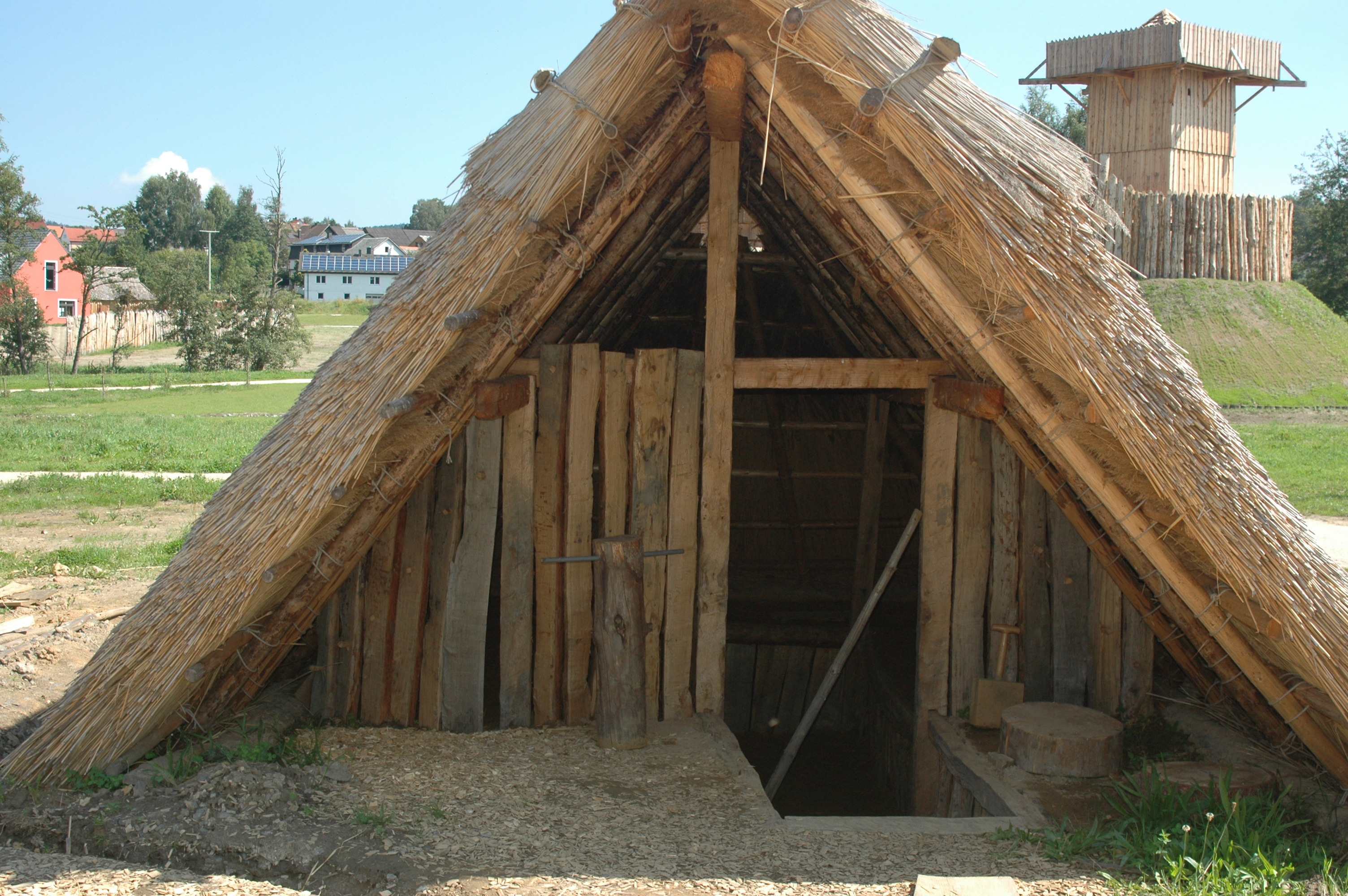 Rekonstruktion eines Grubenhauses in der frühmittelalterlichen Siedlung im Geschichtspark Bärnau-Tachov